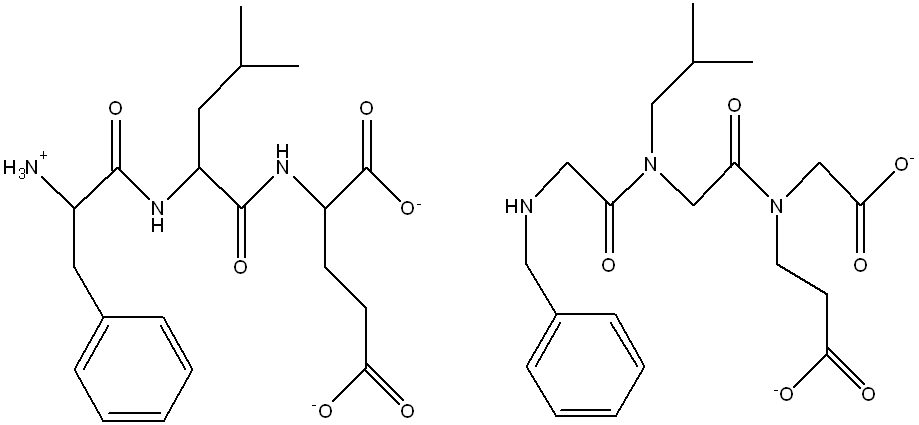 Comparaison entre un tripeptide naturel et un tripeptoide de synthèse